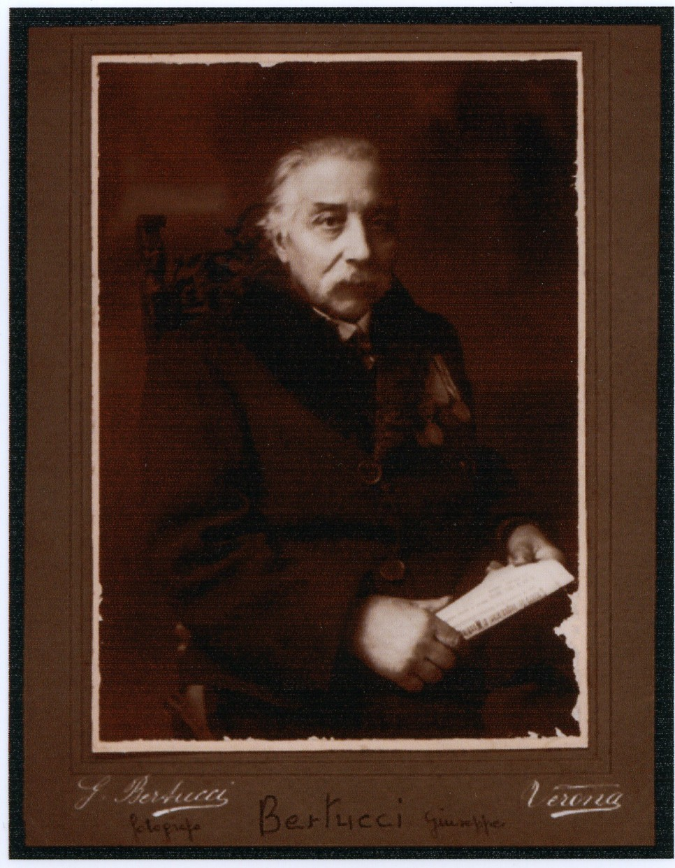 Self-portrait, ca. 1900.